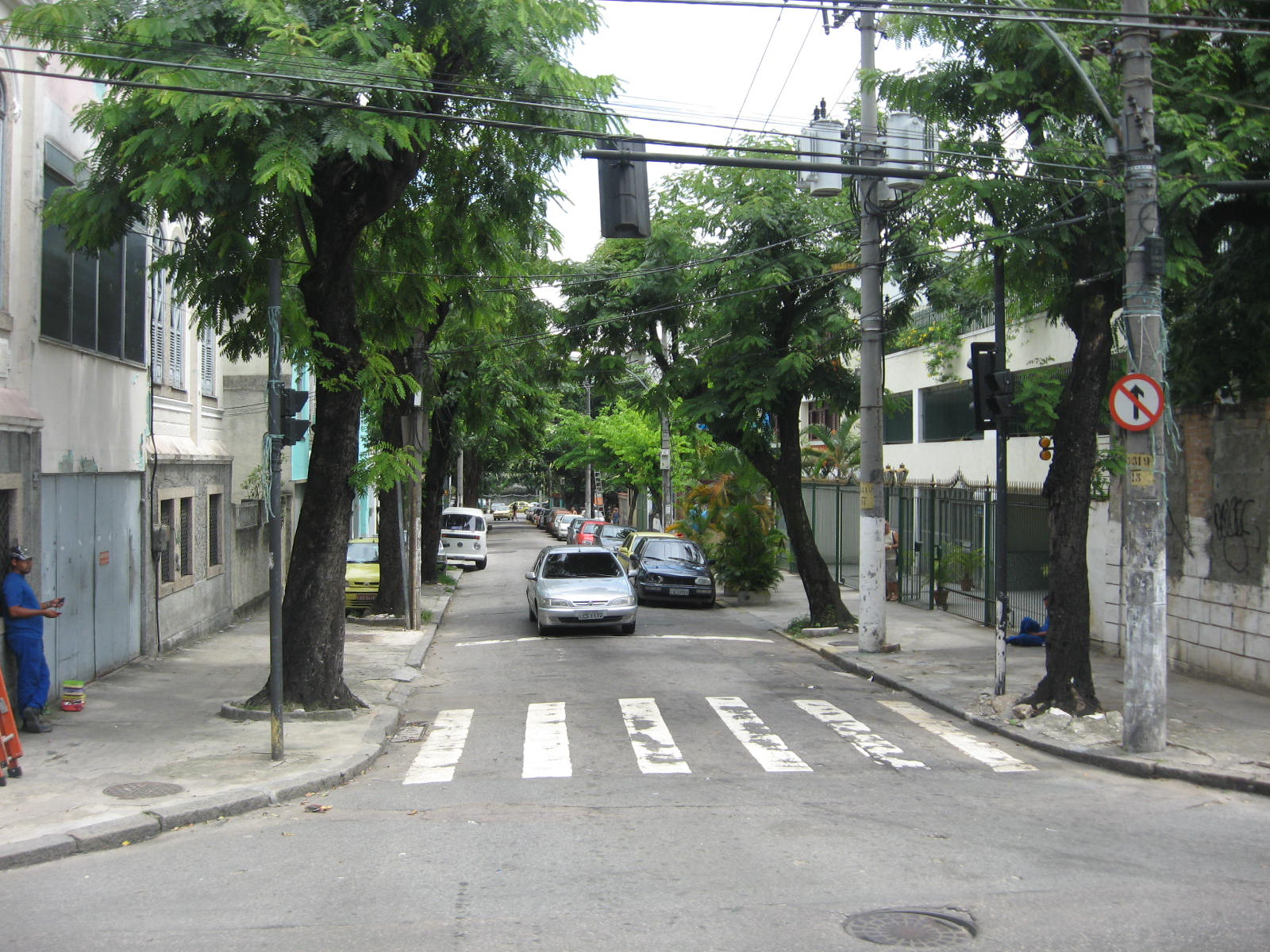 Vista do bairro São Francisco Xavier, no Rio de Janeiro.